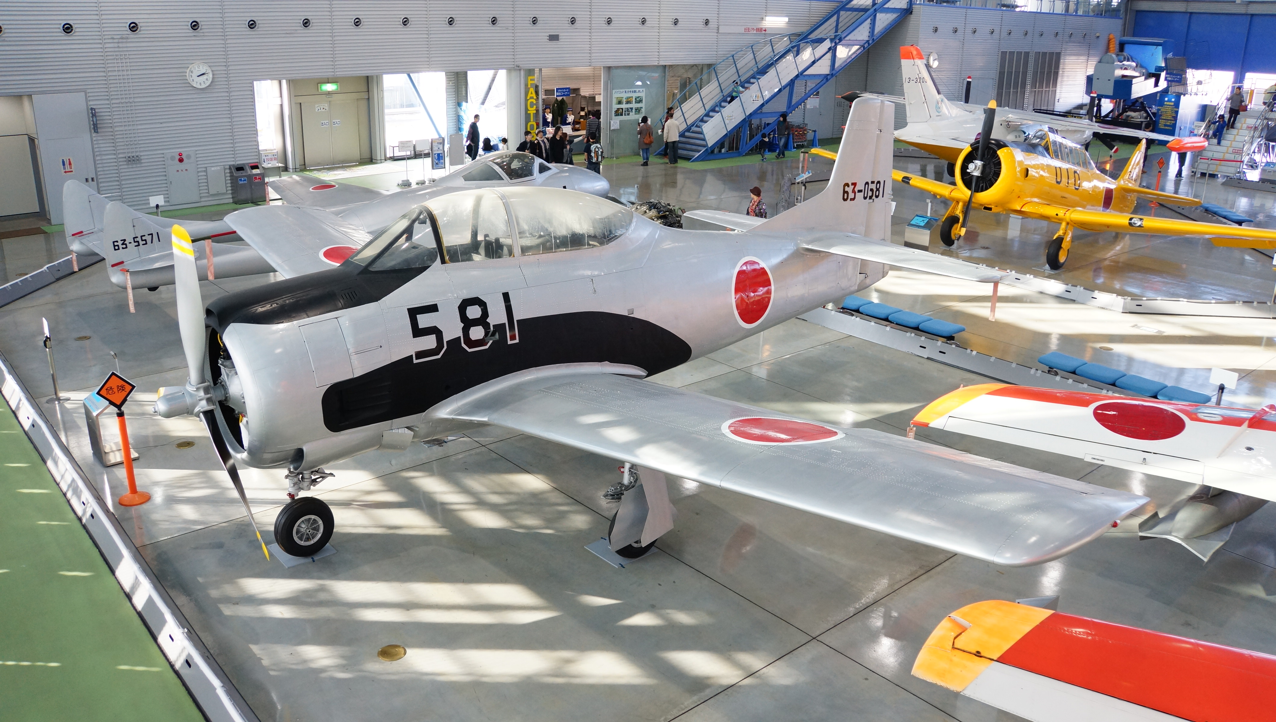 航空自衛隊 T-28B練習機（63-0581号機）。 14年11月24日 浜松基地広報館内にて。